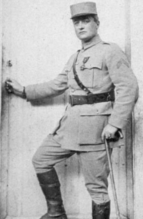 Robert de Kersauson de Pennendreff